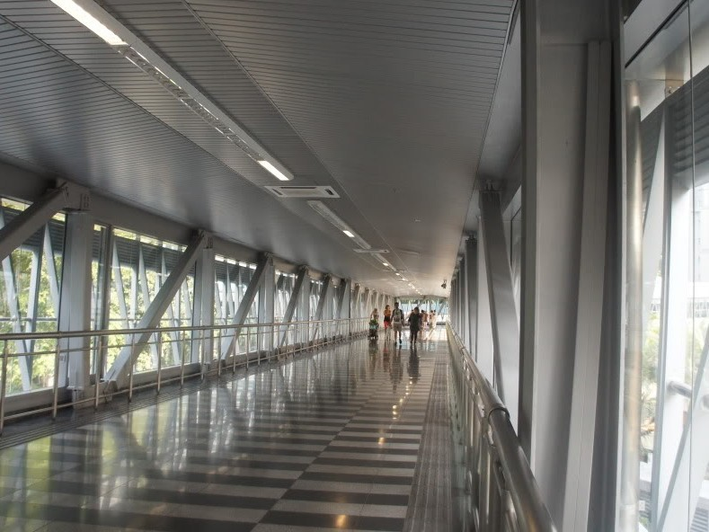 inside BBKLCC skybridge